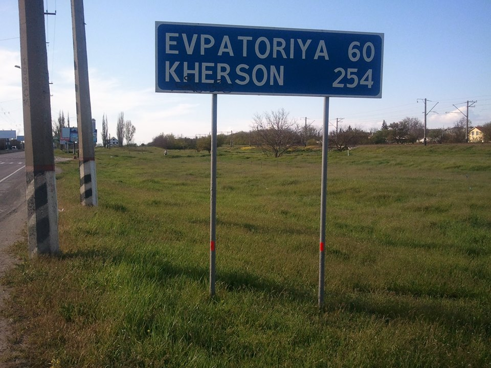 Советский дорожный указатель на Евпаторийском шоссе. У Богдановки, Симферополь.